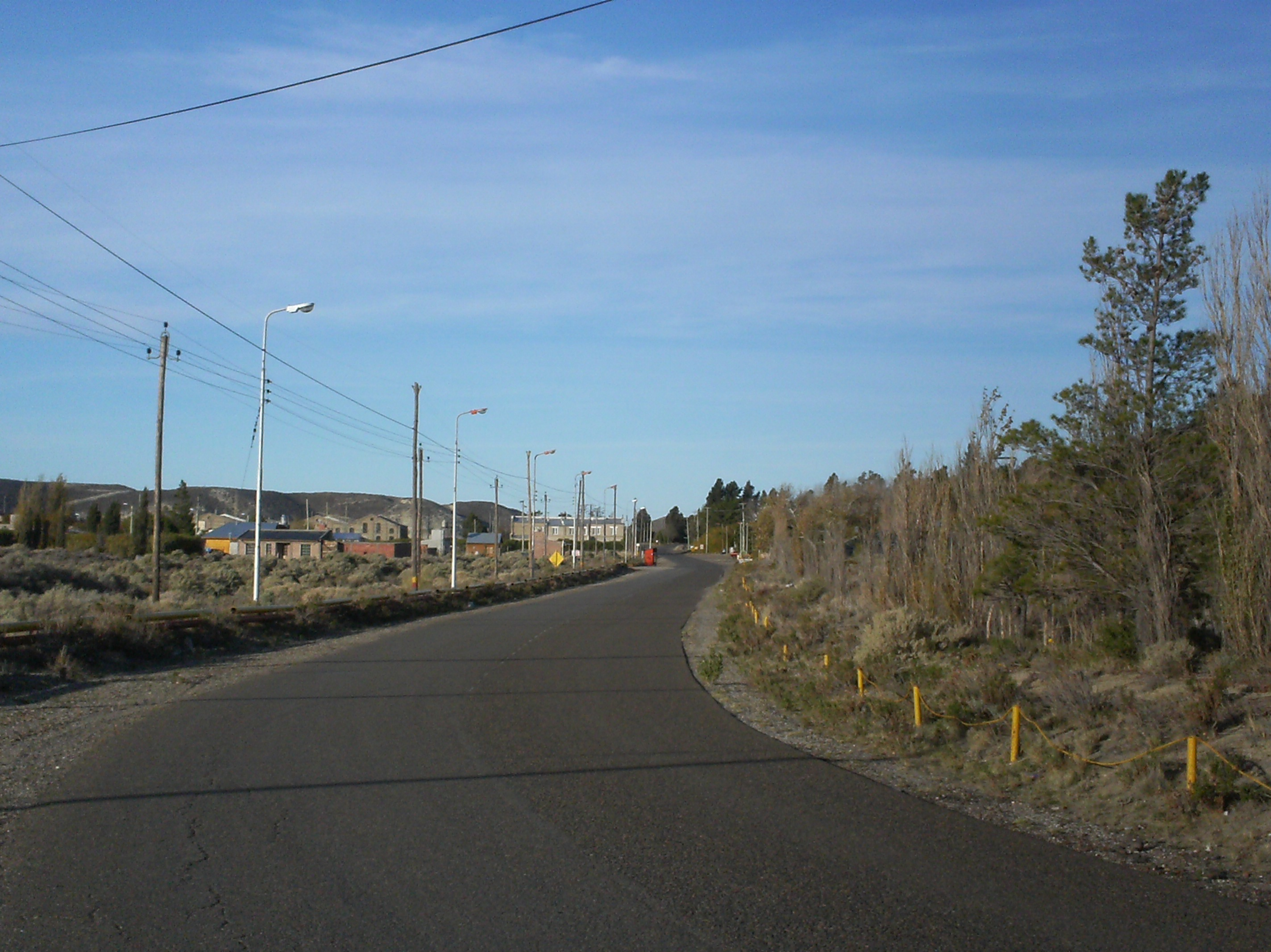 LA ENTRADA AL BARRIO Y ALGUNAS DE SUS CASAS